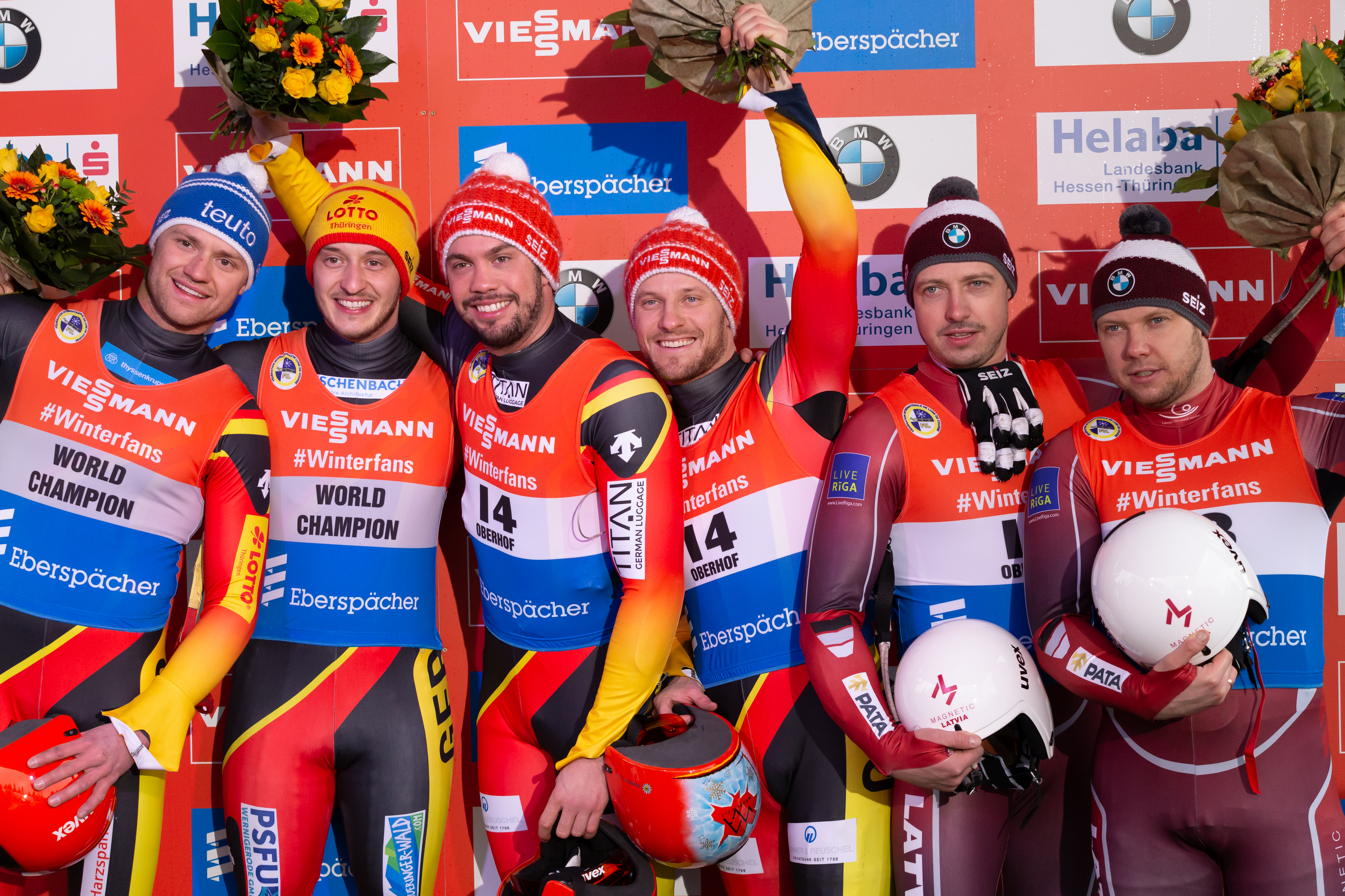 Viessmann Luge World Cup Oberhof; v.li.: Toni Eggert (GER, Deutschland), Sascha Benecken (GER, Deutschland), Tobias Wendl (GER, Deutschland), Tobias Arlt (GER, Deutschland), Andris Sics (LAT, Lettland), Juris Sics (LAT, Lettland); Flower Ceremony, Blumenzeremonie, Siegerehrung; Jubel, celebration